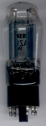 Duodioda prostownicza